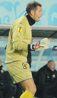 Francesco Benussi